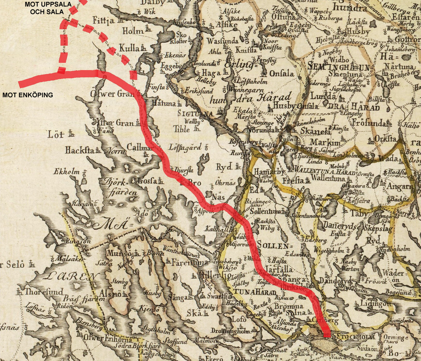 Del av 1772 års vägkarta över Stockholm med omgivningar med Enköpingsvägen